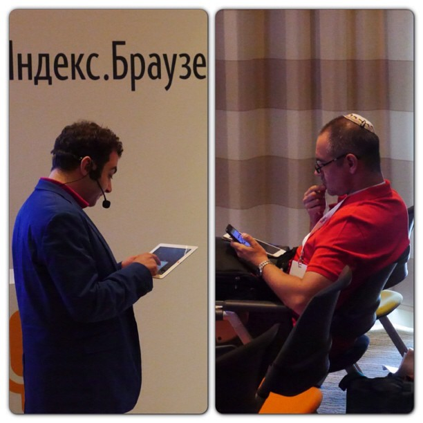 18 июня 2013 года: презентация версий Яндекс.Браузера для смартфонов и планшетов.